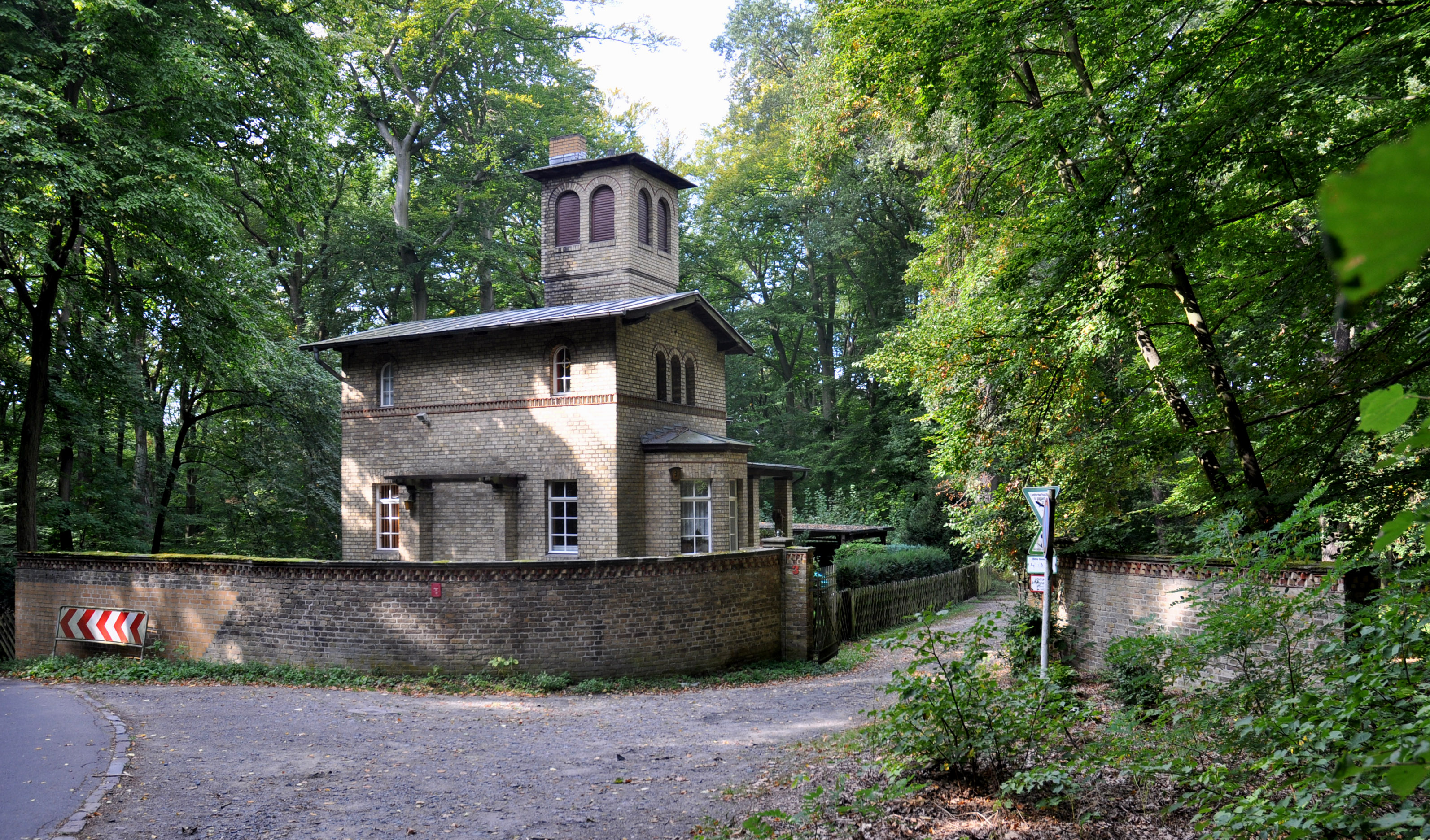 Das Wildparktor am Park Klein-Glienicke